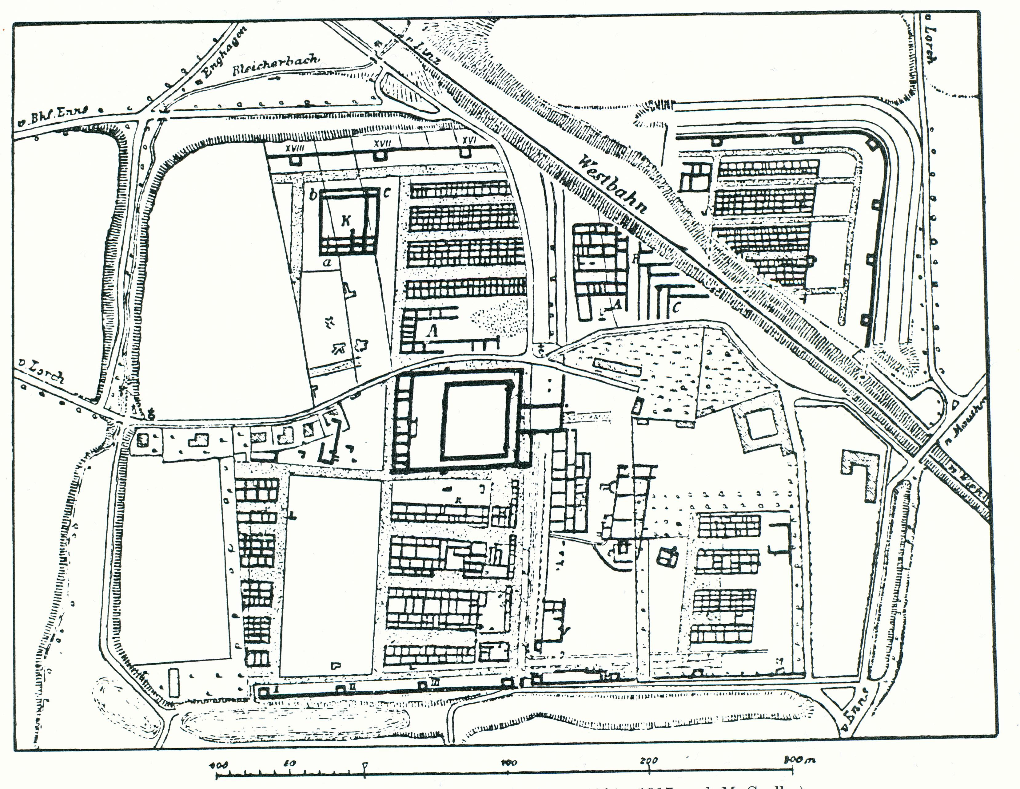 Grabungsplan LL Lauriacum 1904 (nach Max von Groller-Mildensee)